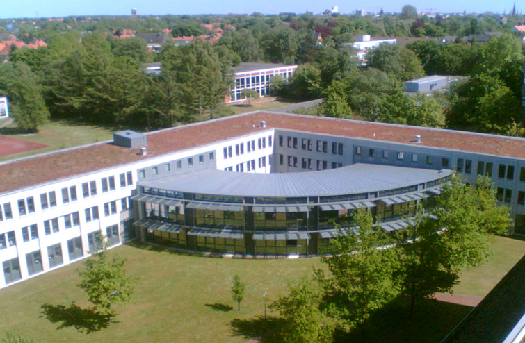 Universität Oldenburg, Blick auf Gebäude A5 vom AVZ (A1-A4) aus